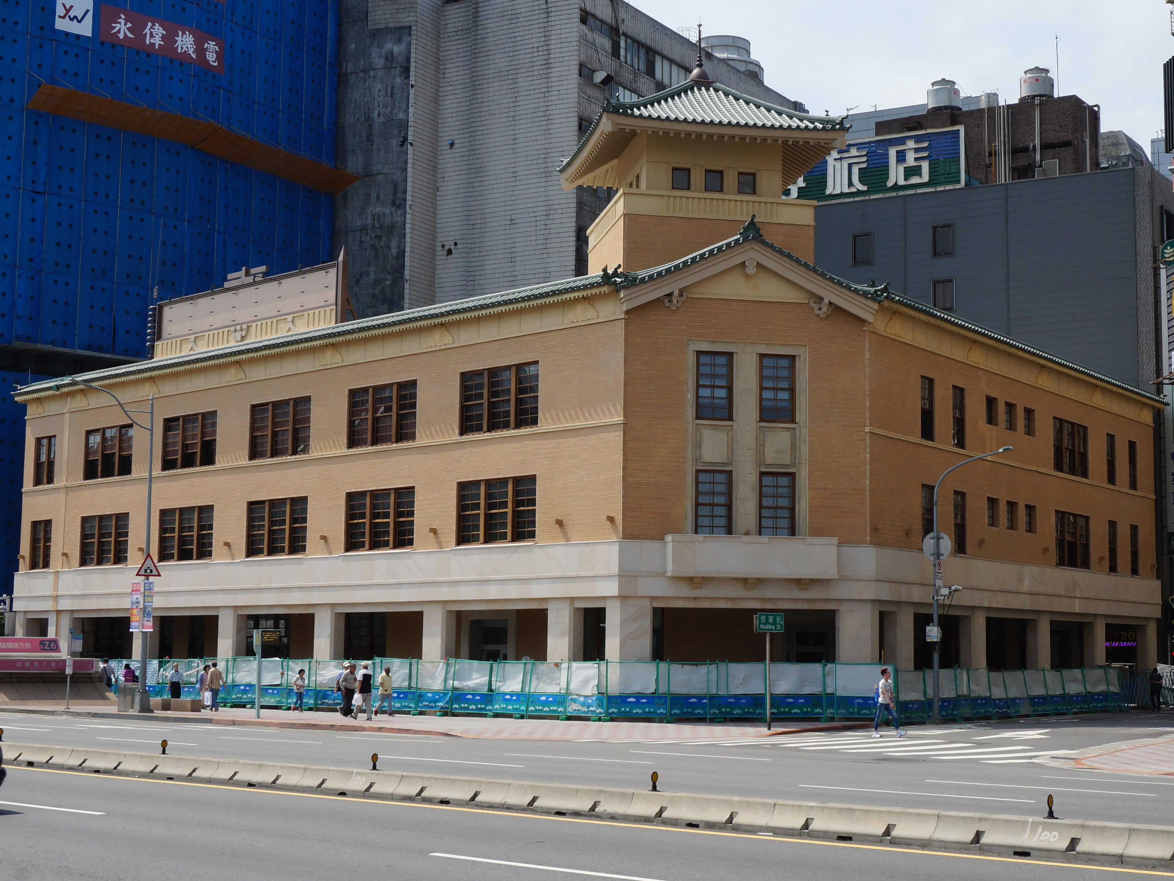 中文（台灣）: 臺北市中正區忠孝西路一段與懷寧街口，原大阪商船臺北支店修復工程。